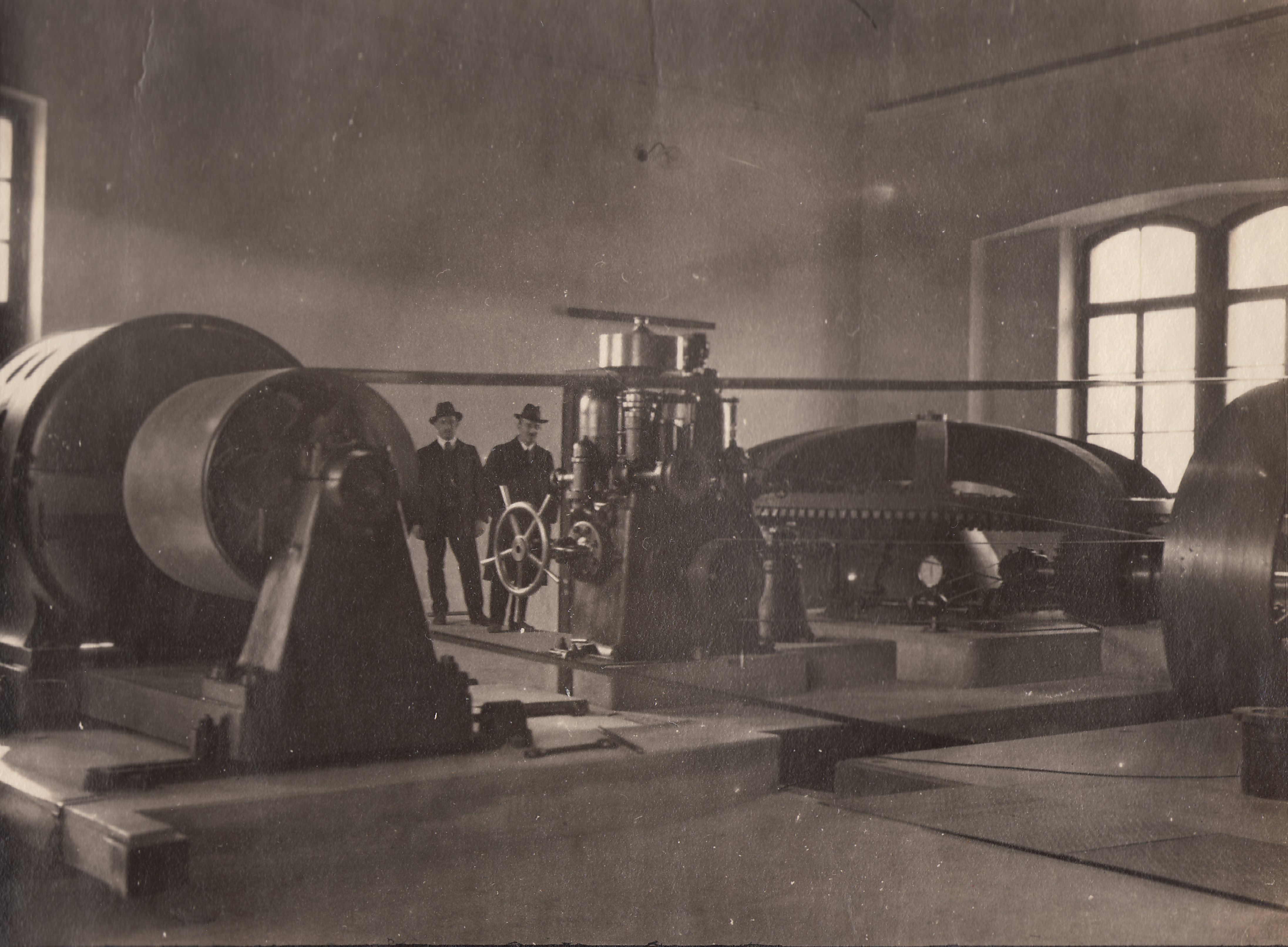 Francis-Turbine von Escher Wyss mit Drehzahlregler und Generator der Maschinenfabrik Oerlikon im Kraftwerk Höngg im Jahr 1918